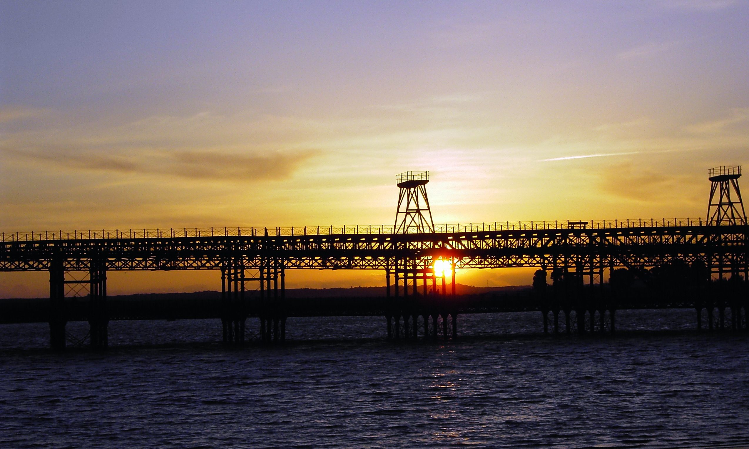 Muelle del Tinto 2007